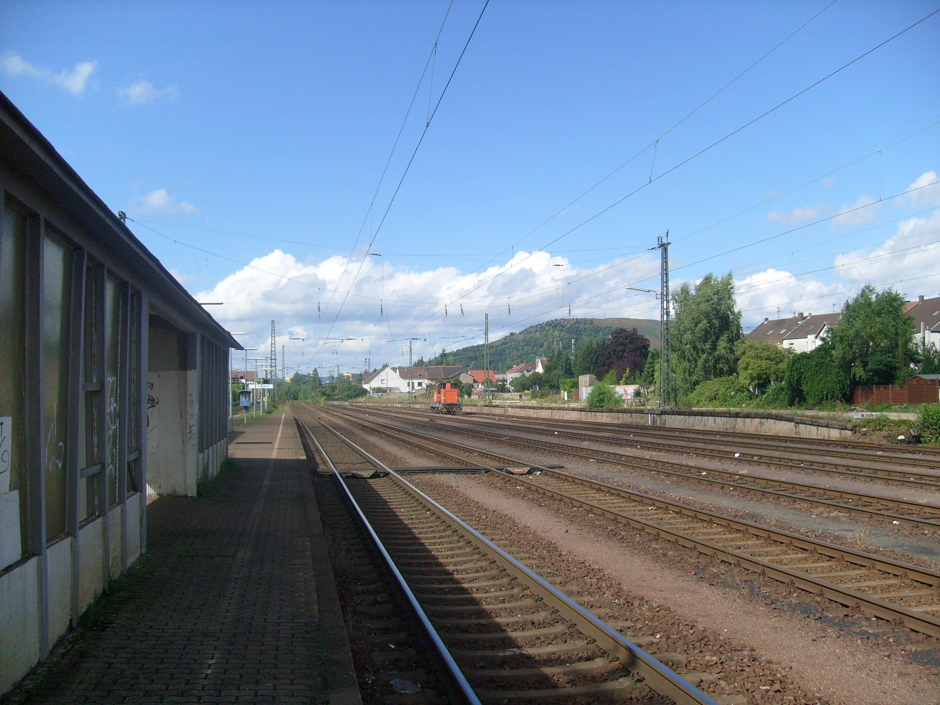 Ensdorfer Bahnhof und Bergehalde